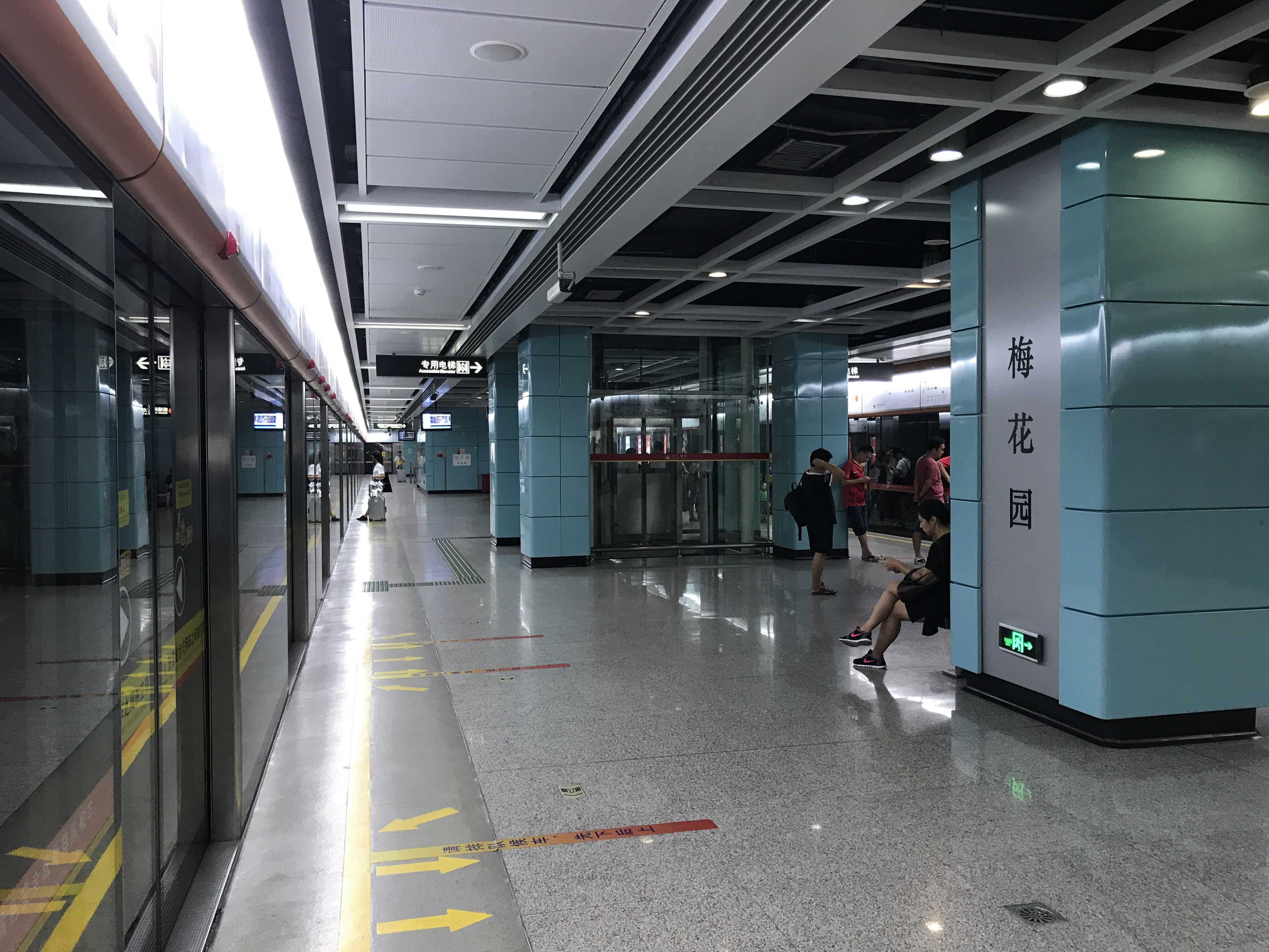 广州地铁梅花园站